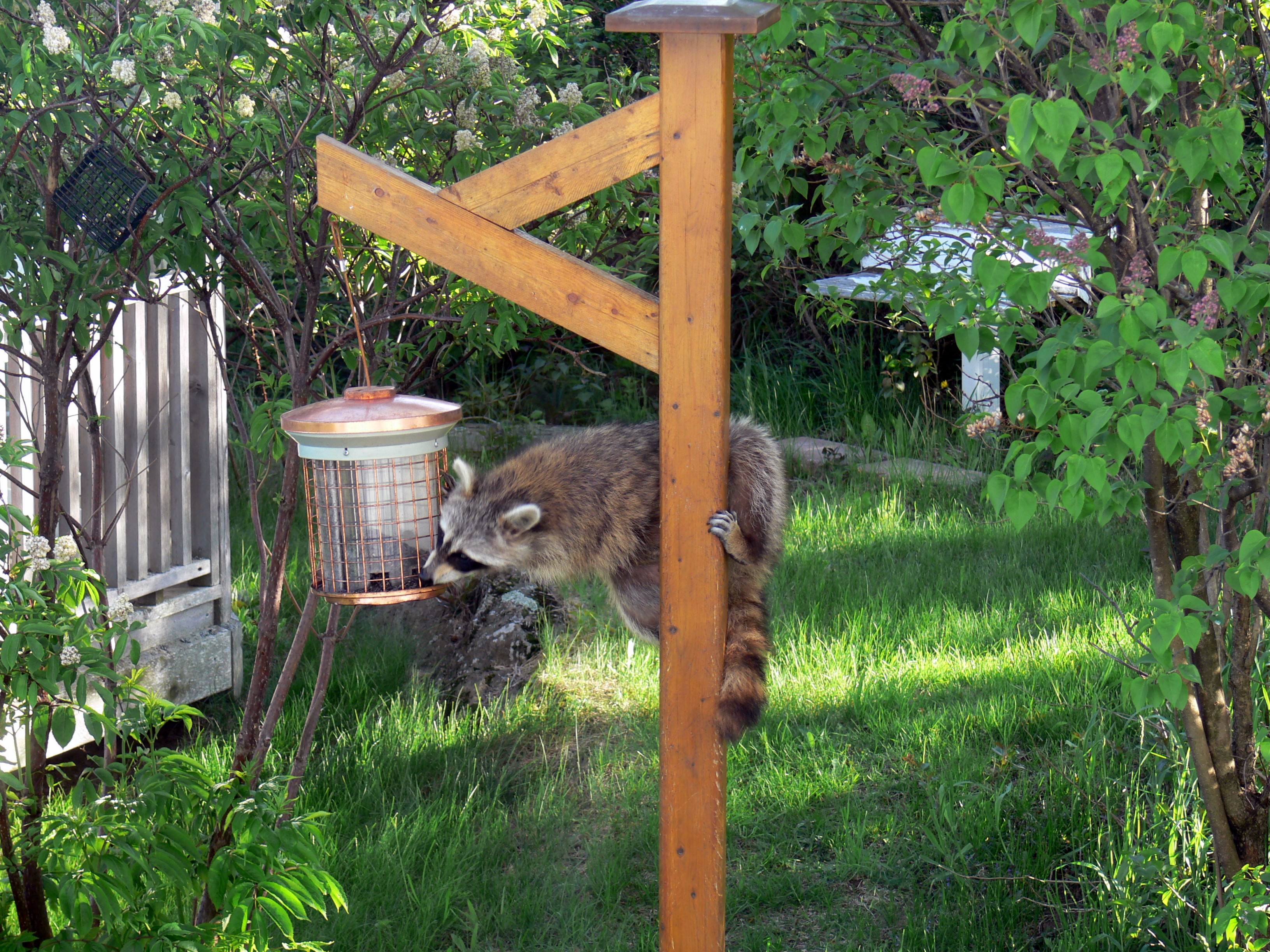 Un raton laveur femelle se nourrissant à même la mangeoire d'oiseaux installée dans le parterre.Kamouraska, Québec